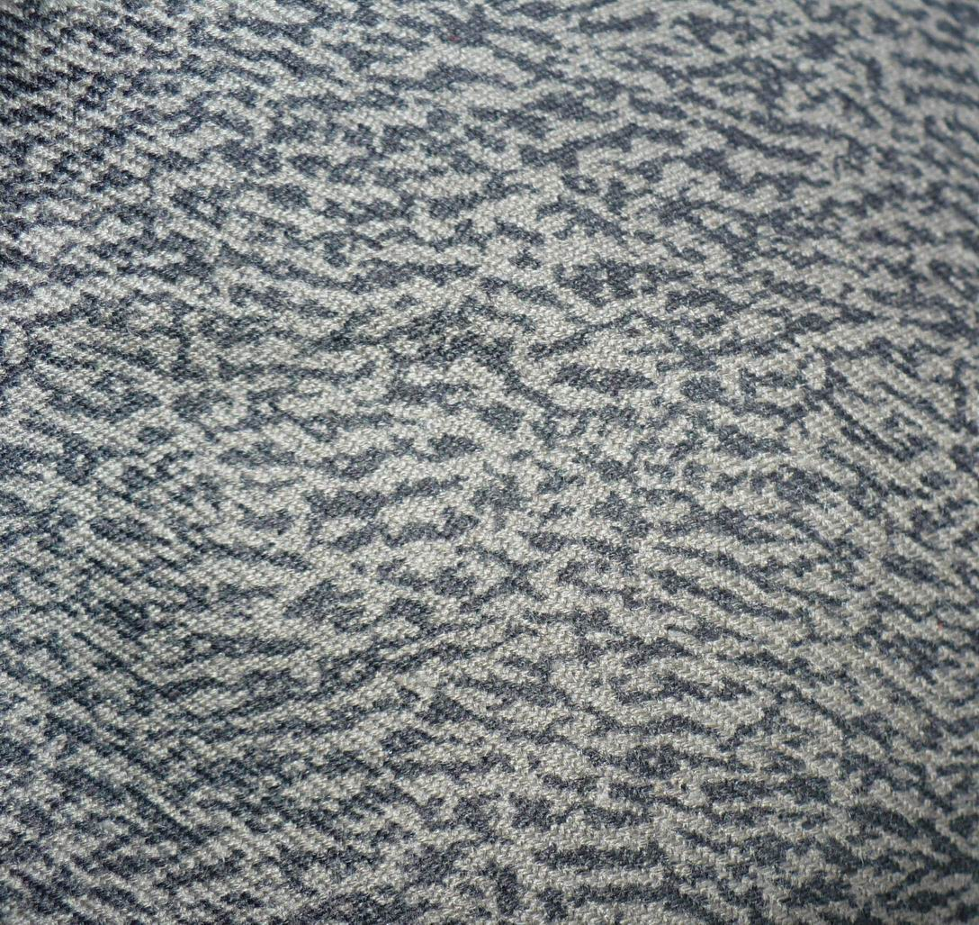 Tkanina z nadrukiem mora w wersji dla policji - szarym.